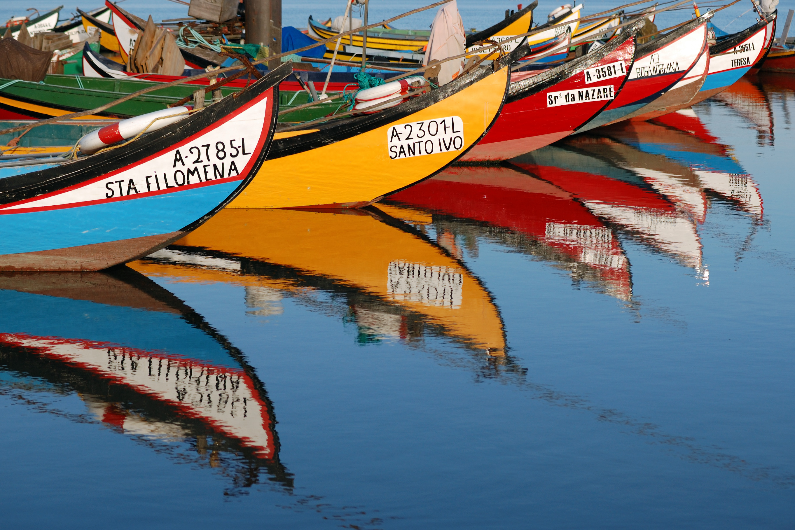 Ria de Aveiro, Portugal [2008]